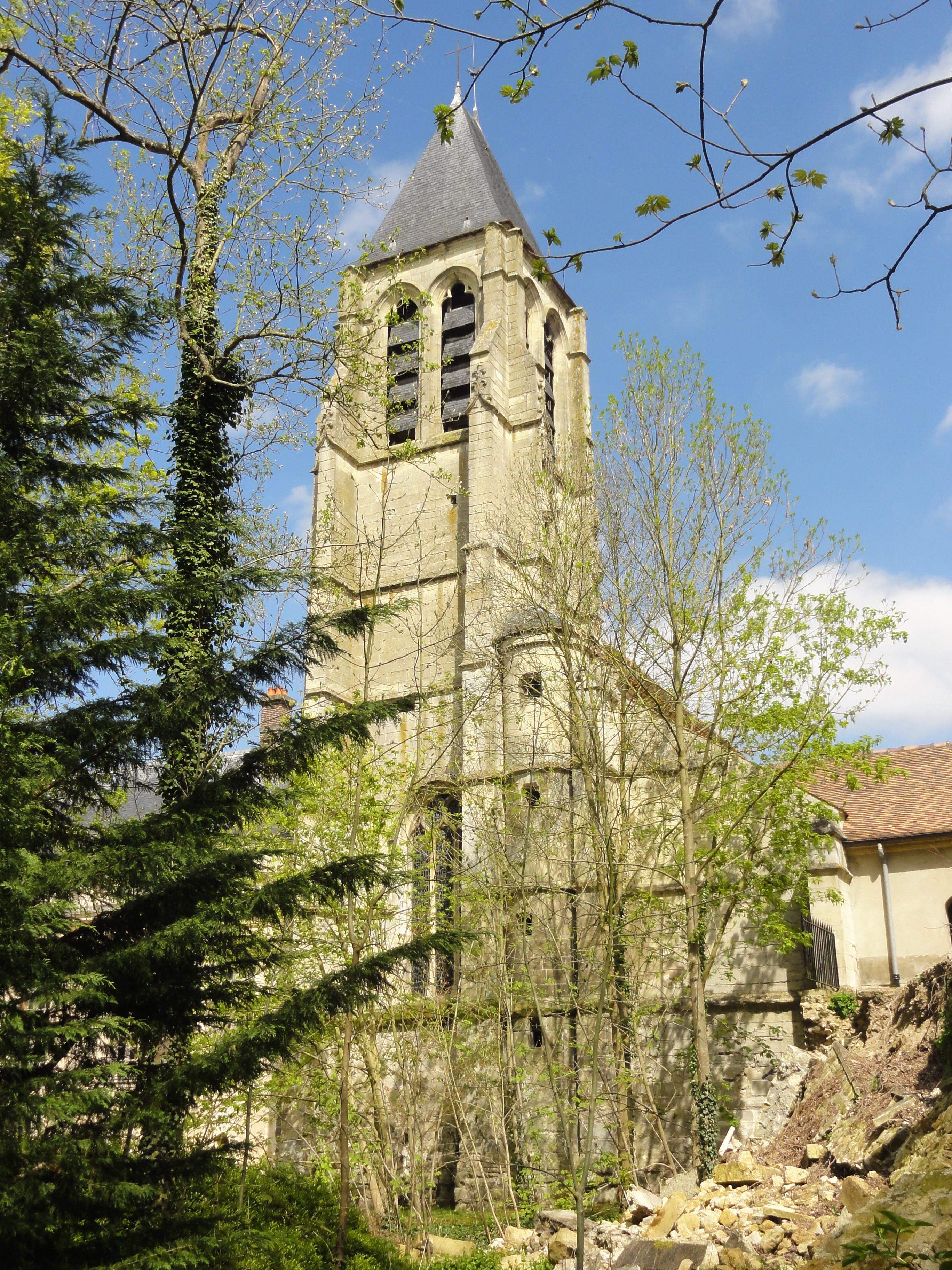 Église Saint-Denis de Méry-sur-Oise - voir titre.